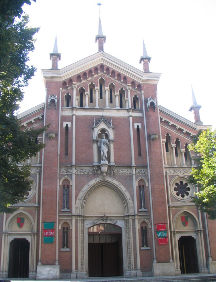 Asti, Chiesa attuale di San Pietro.)